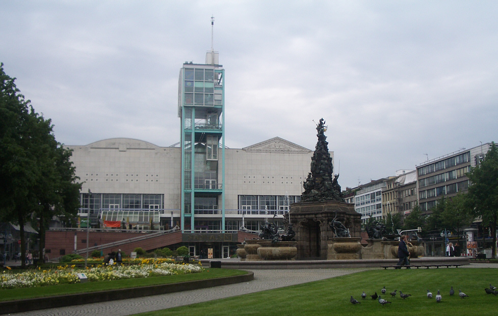 Mannheim, Germany: Paradeplatz with Stadthaus (N1)